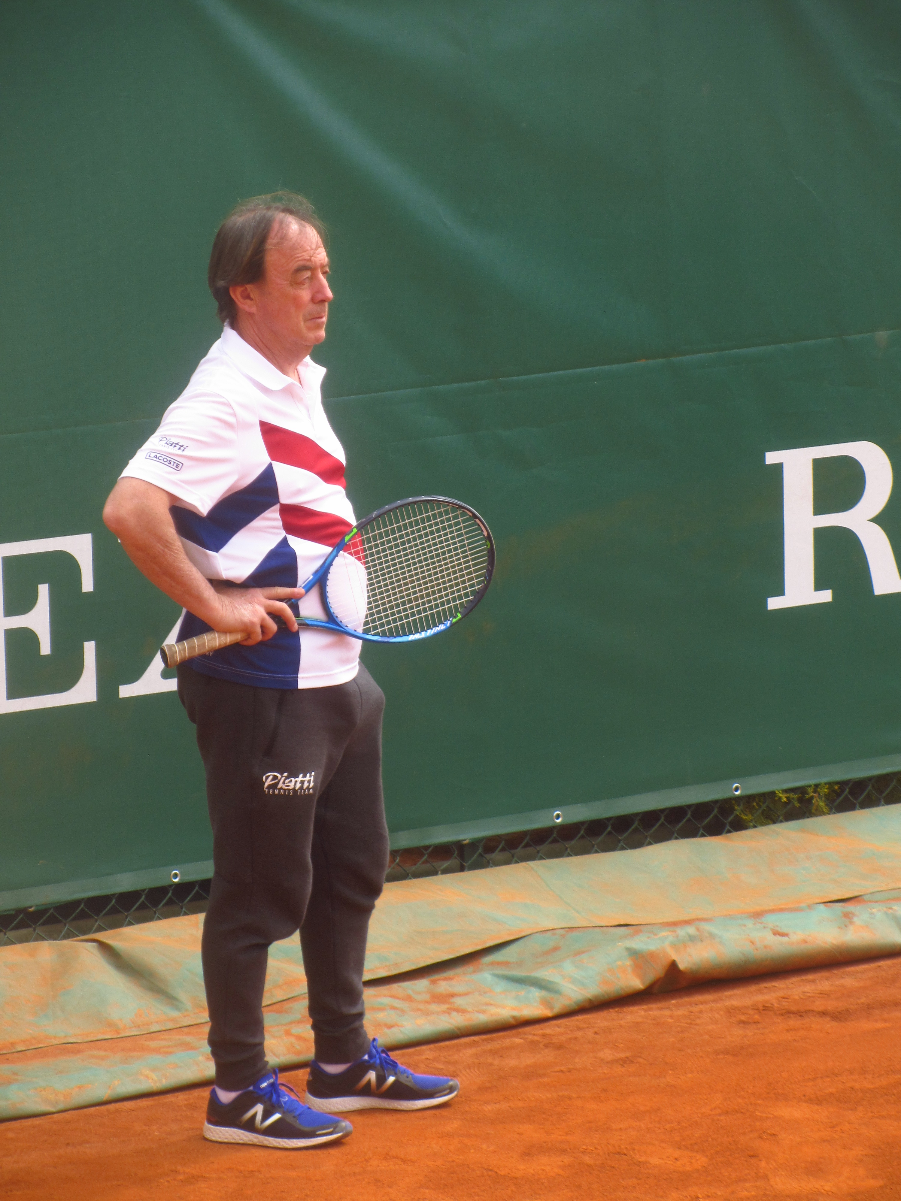 Riccardo Piatti à Monte-Carlo en 2018.